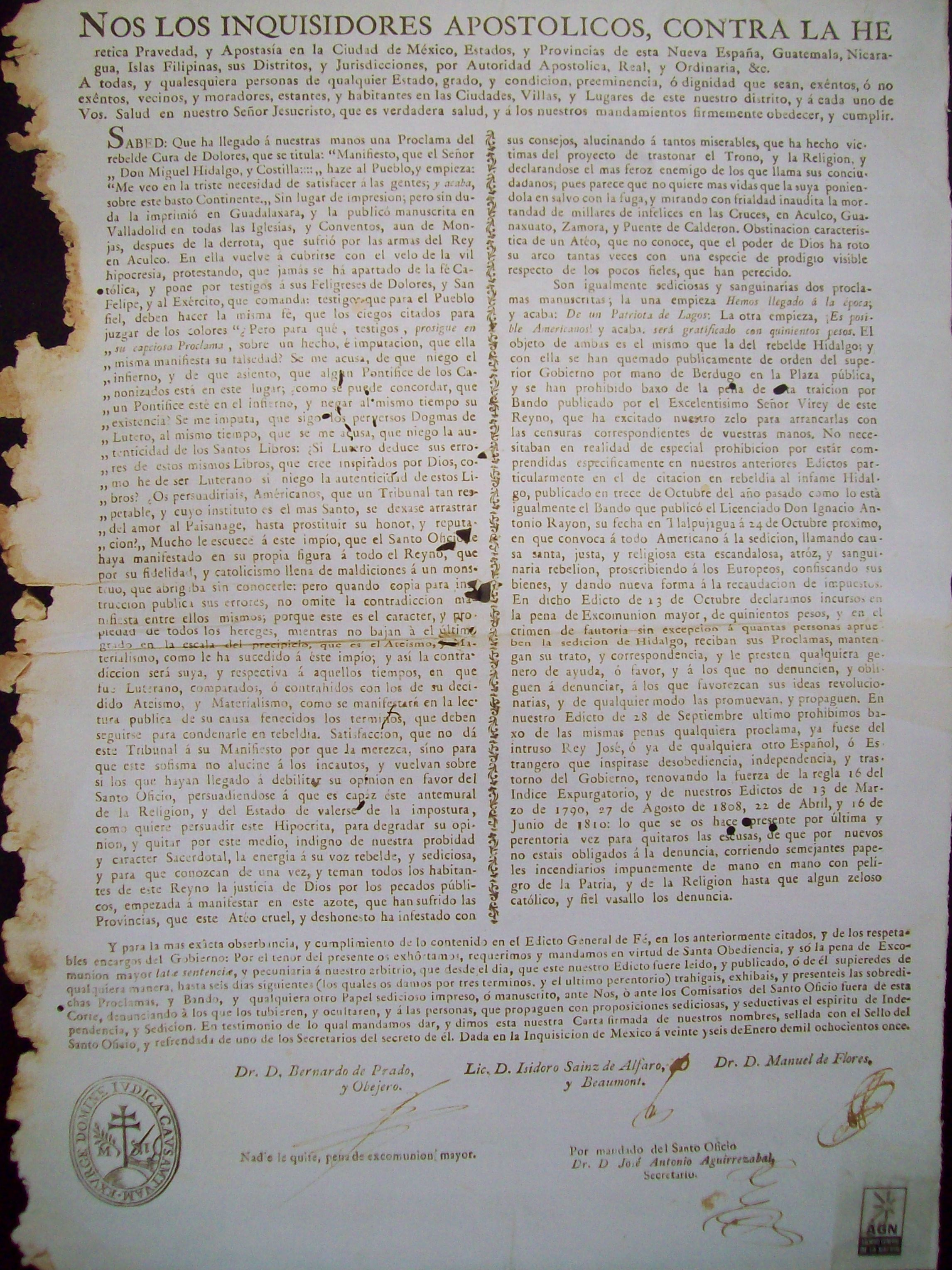 Edicto contra Miguel Hidalgo. Archivo General de la Nación de México. Fuente: Memoria de las revoluciones N°5 (2009) ISBN 978-607-7748-04-5